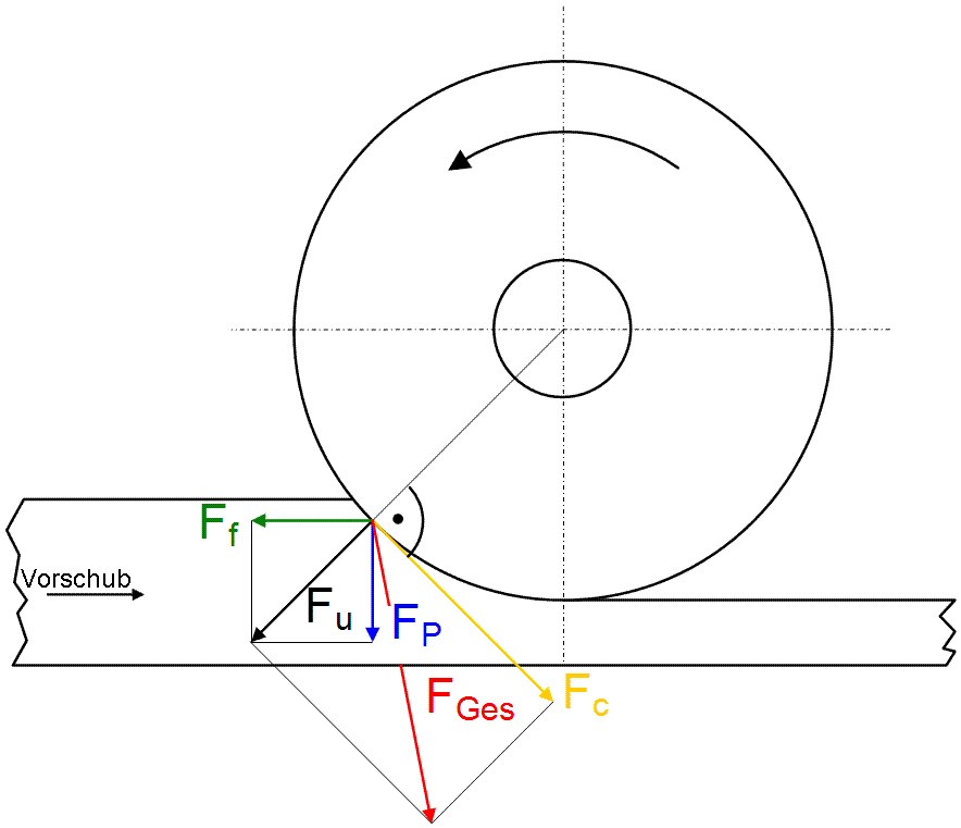 Kräfte beim Gleichlauffräsen